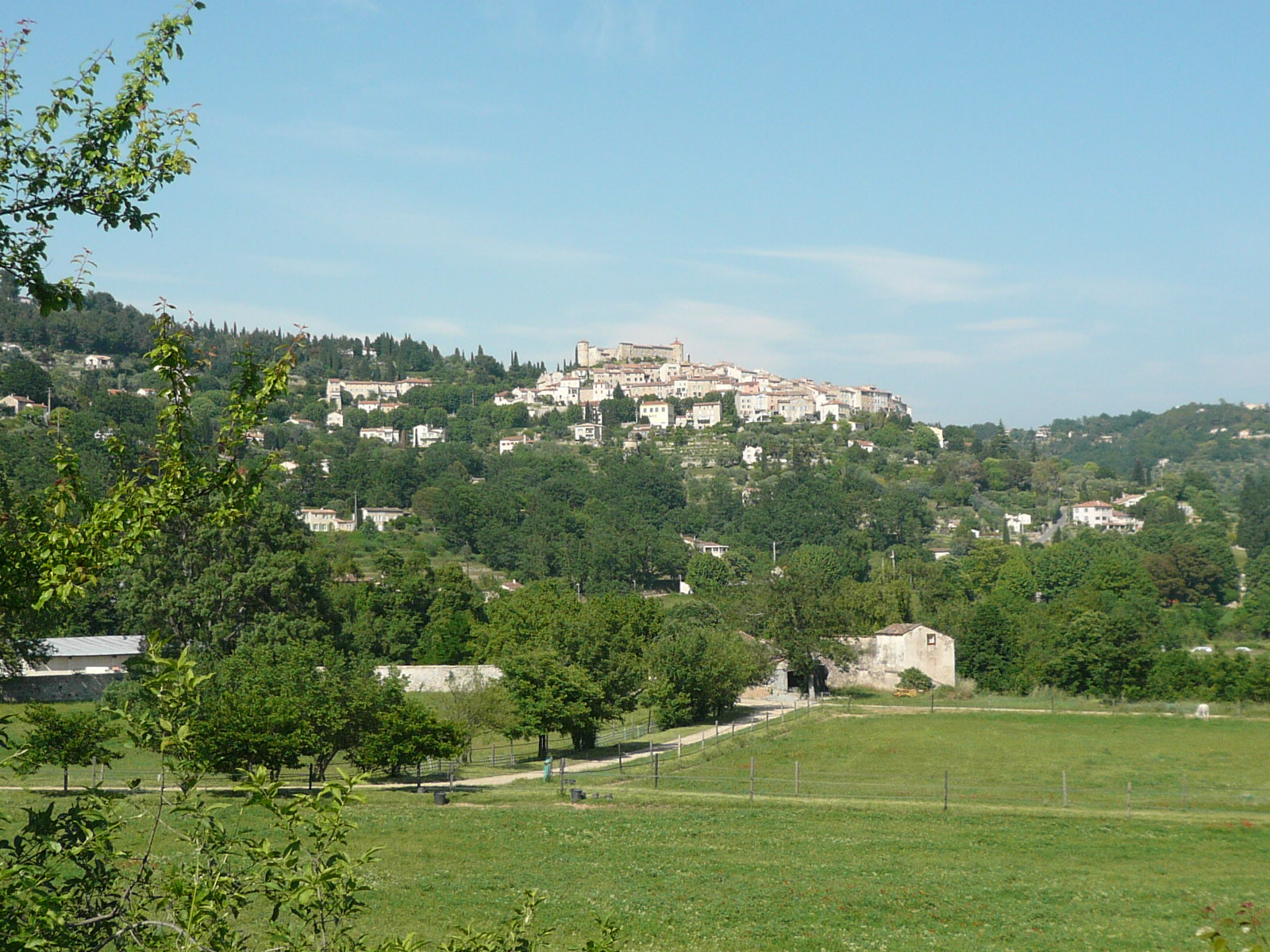 Vue de Callian en contrebas